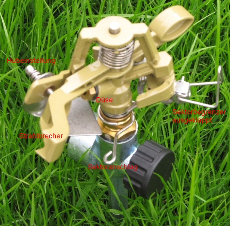 Einfacher Impulsregner mit Beschriftung der wesentlichen Elemente